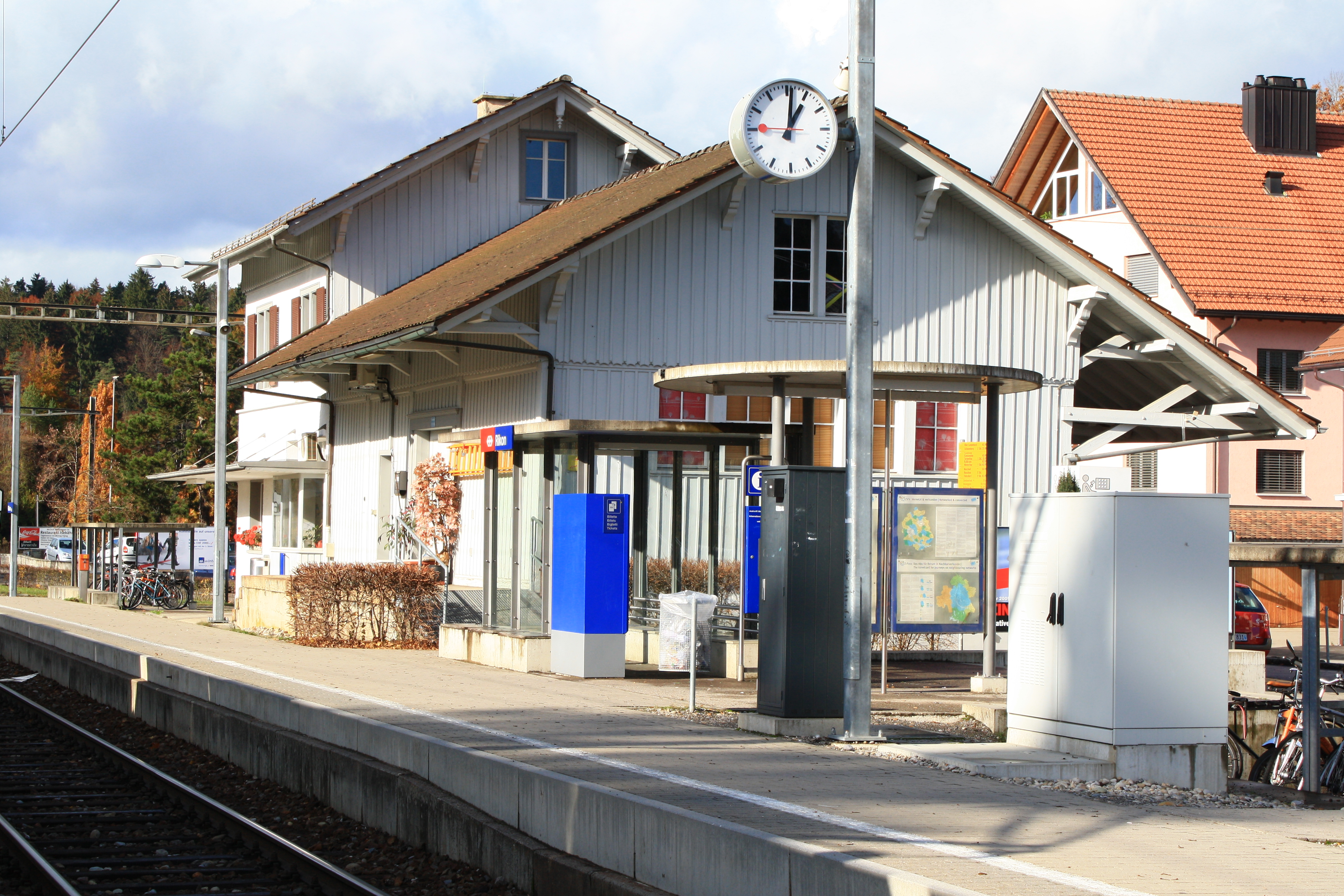 S-Bahn Zürich train station Rikon in the Töss Valley (Tösstal) in Switzerland